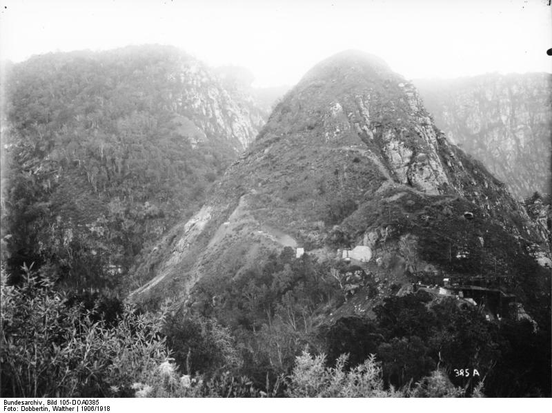 Usambaragebirge bei Neu Hornow